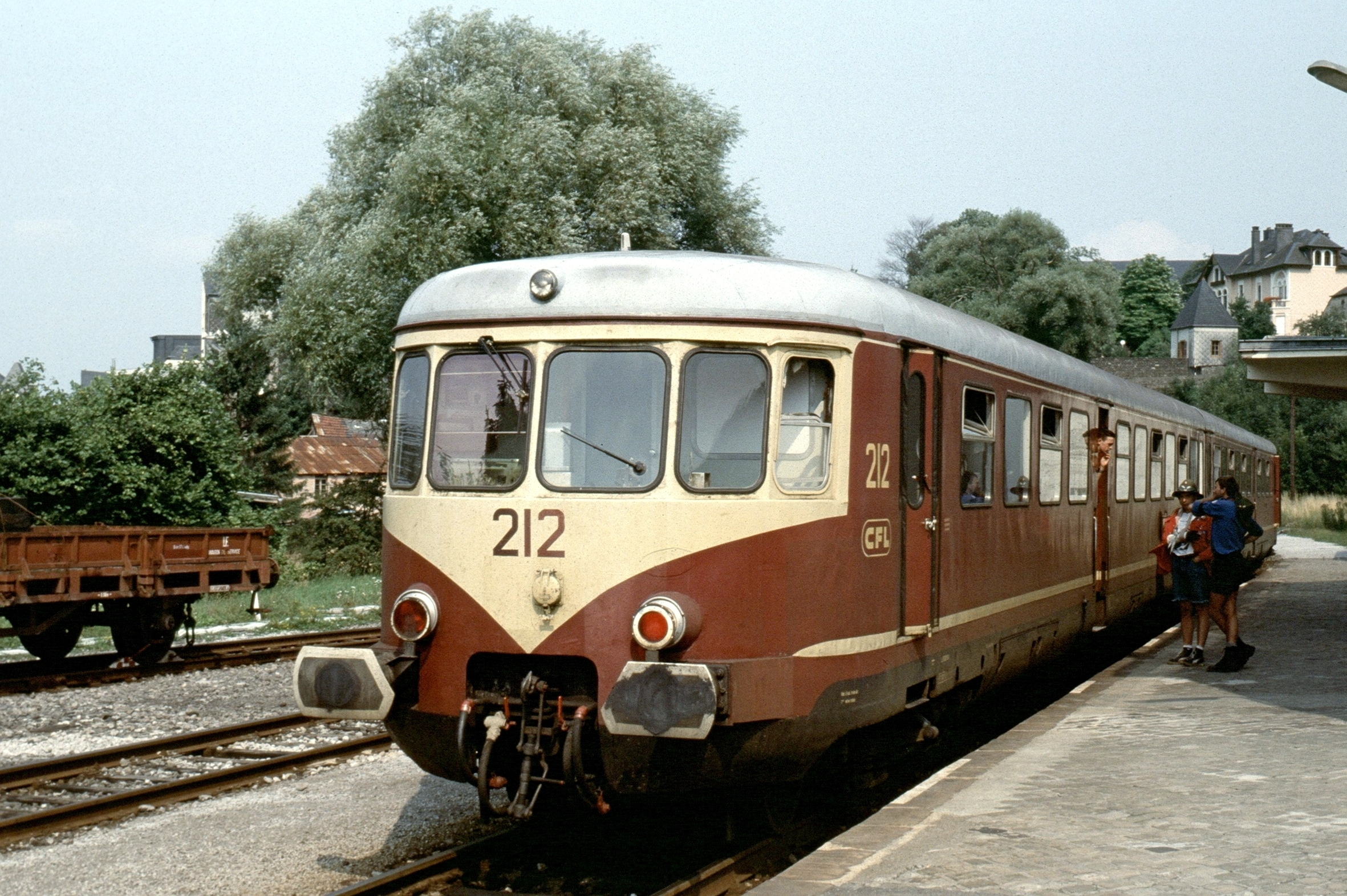 CFL Westwaggon Triebwagen 212 in Wiltz